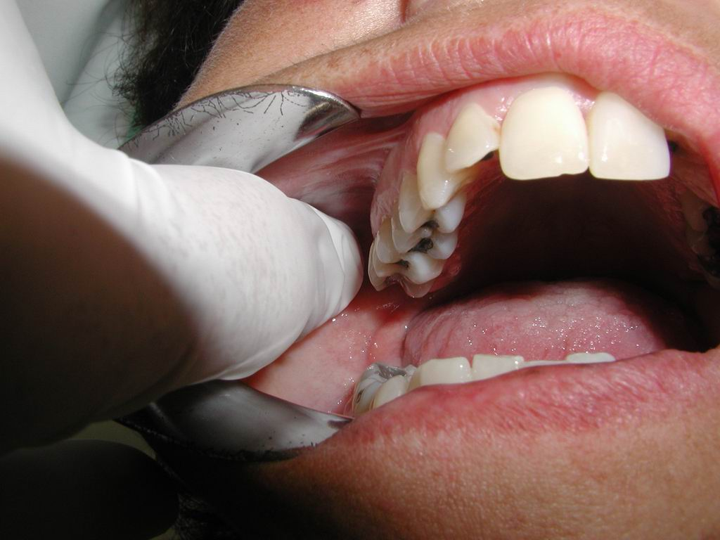 Comprobación del CAT mediante la palpación en la cara interna de la rama mandibular.